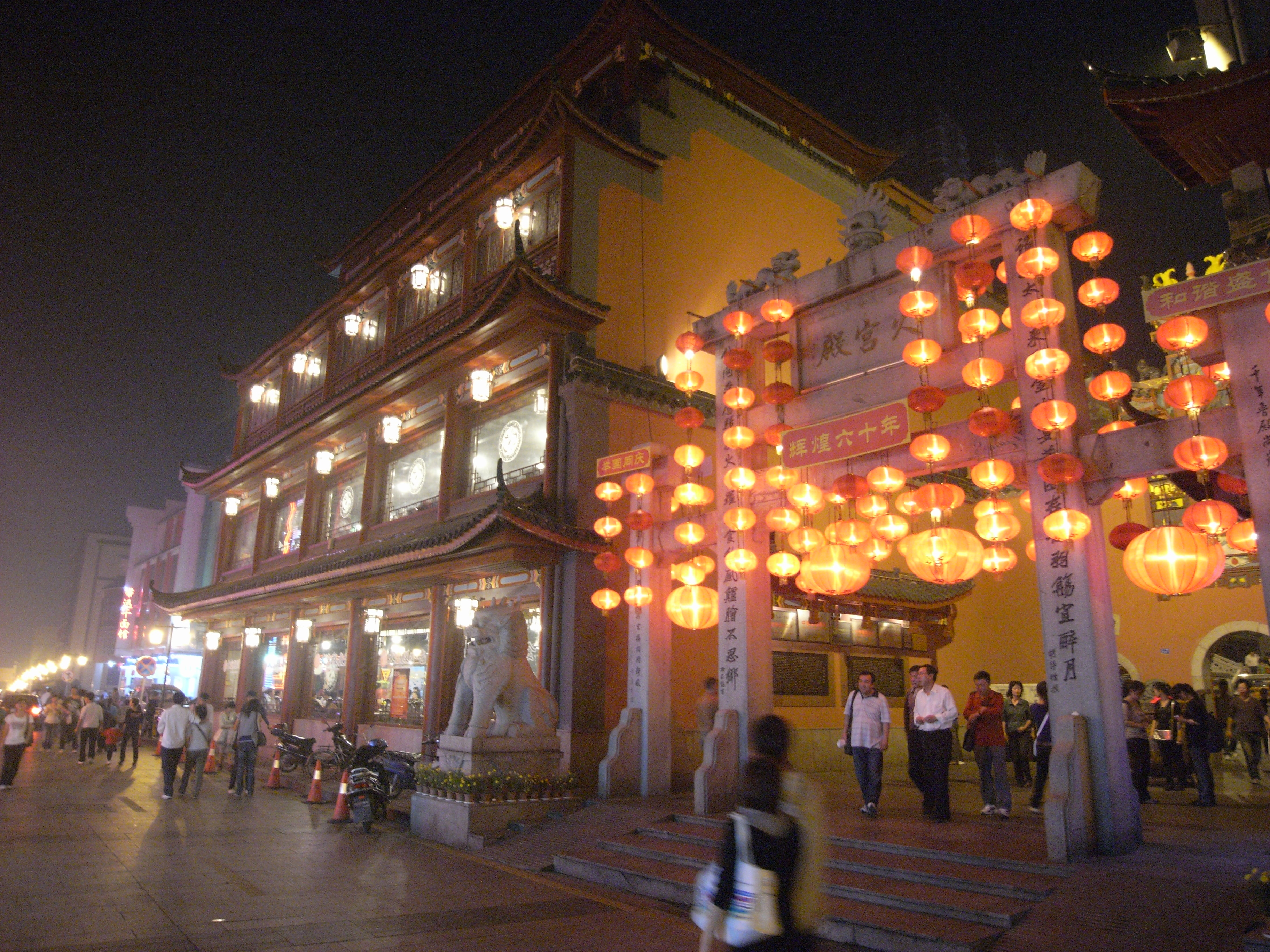 坡子街火宫殿